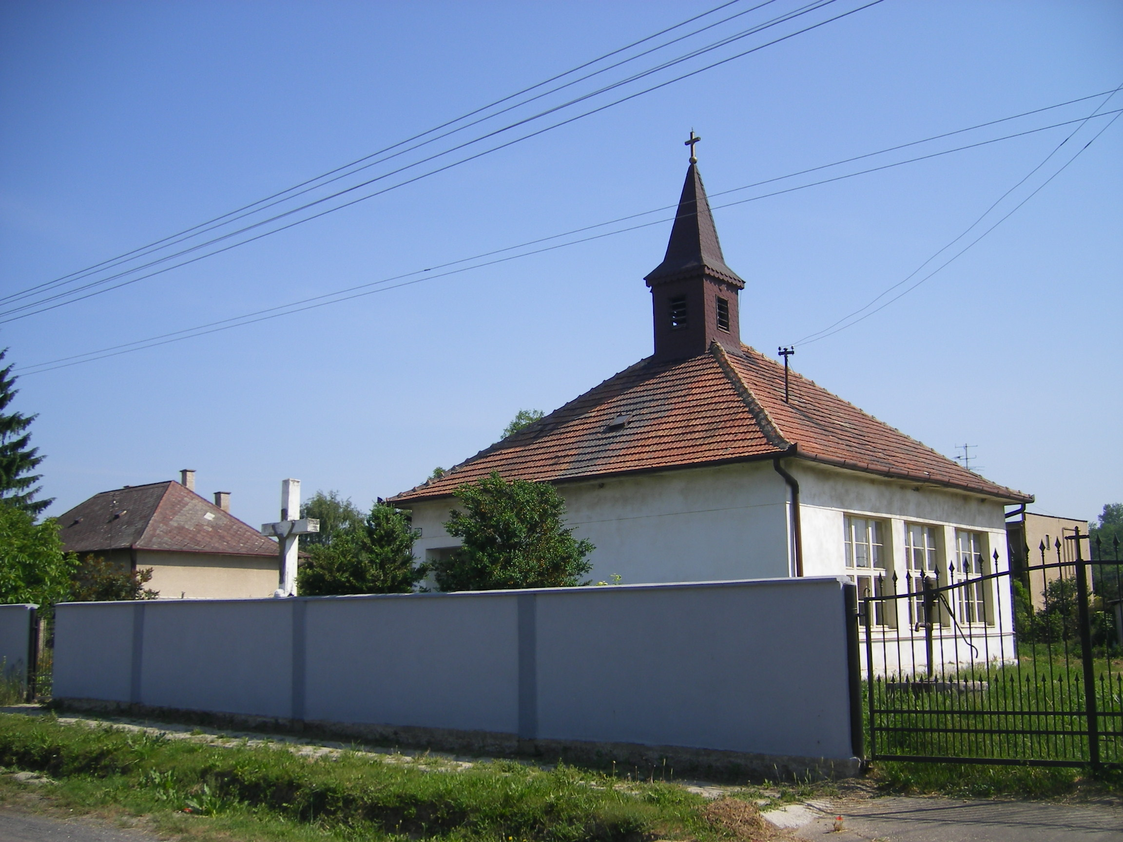 Madar